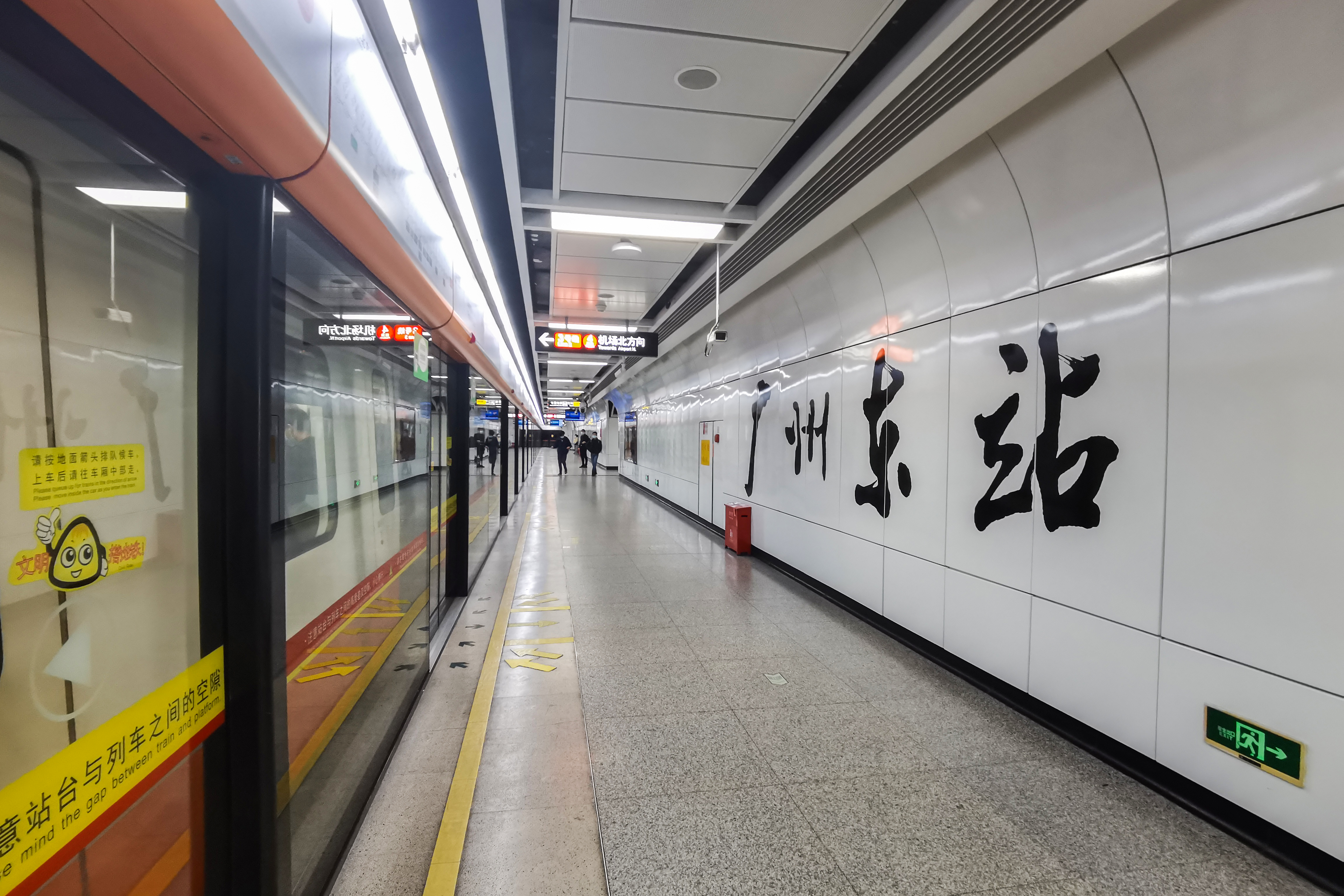 广州地铁广州东站